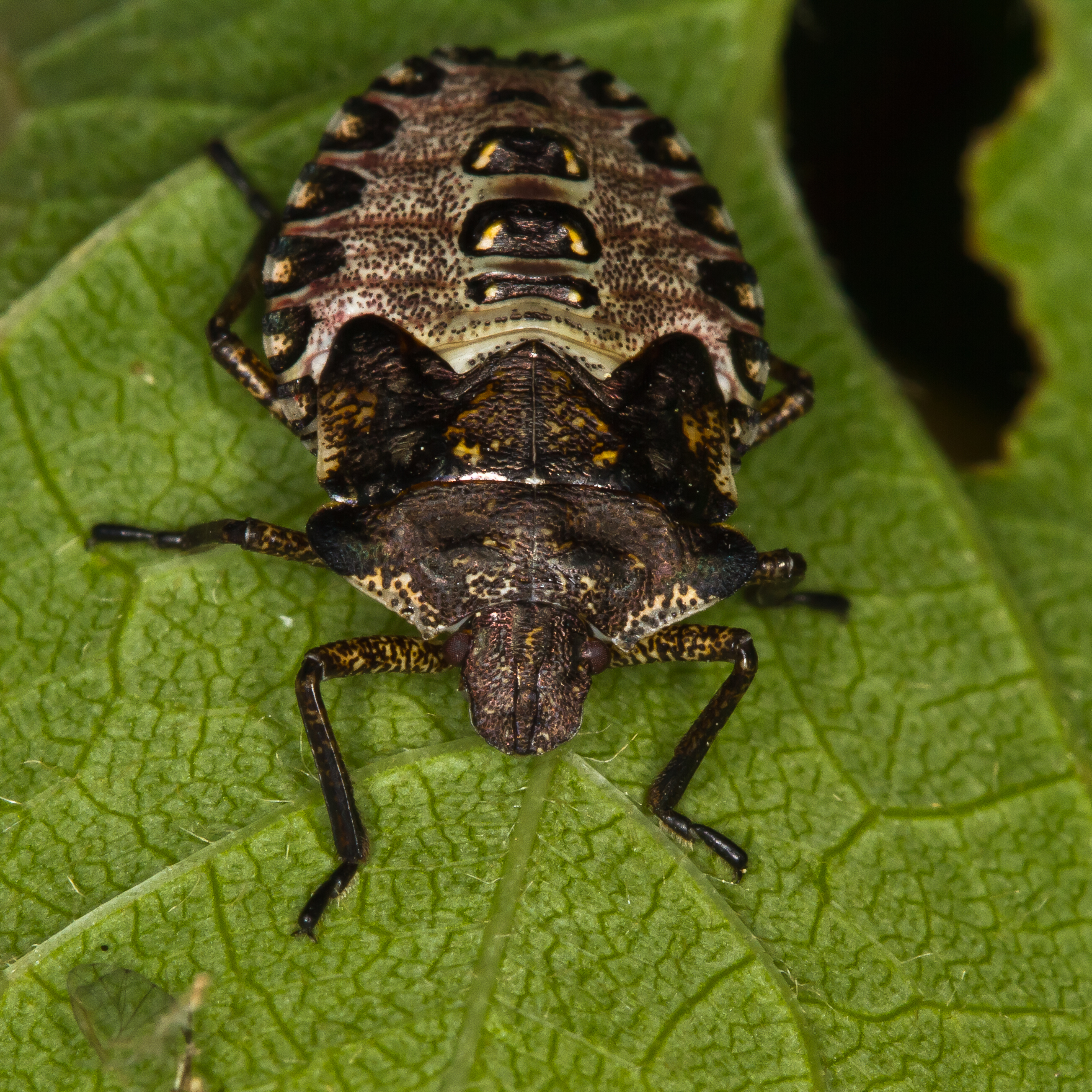 Sachsen, Waldrand: Larve der Rotbeinigen Baumwanze